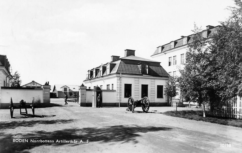 Kasernvakten vid Norrbottens artillerikår (A 5), Sveavägen i Boden. Åren 1954–2005 kasernvakt för Norrlands signalbataljon (S 3). Från 2005 kasernvakt Artilleriregementet (A 9).